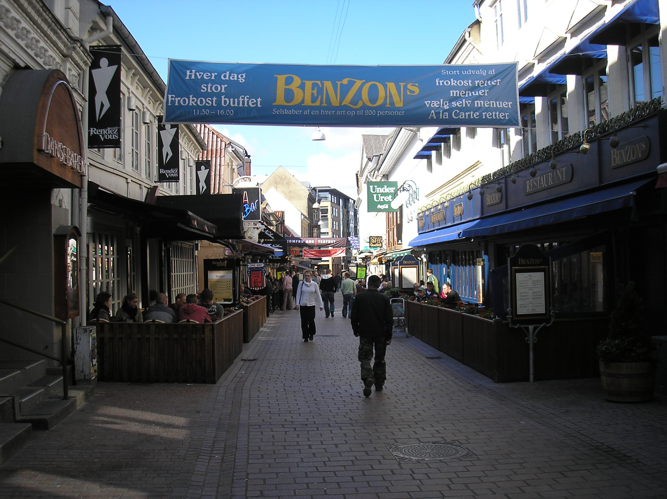 Foto tomada por Jorge González González. Picture taken by Jorge González González.